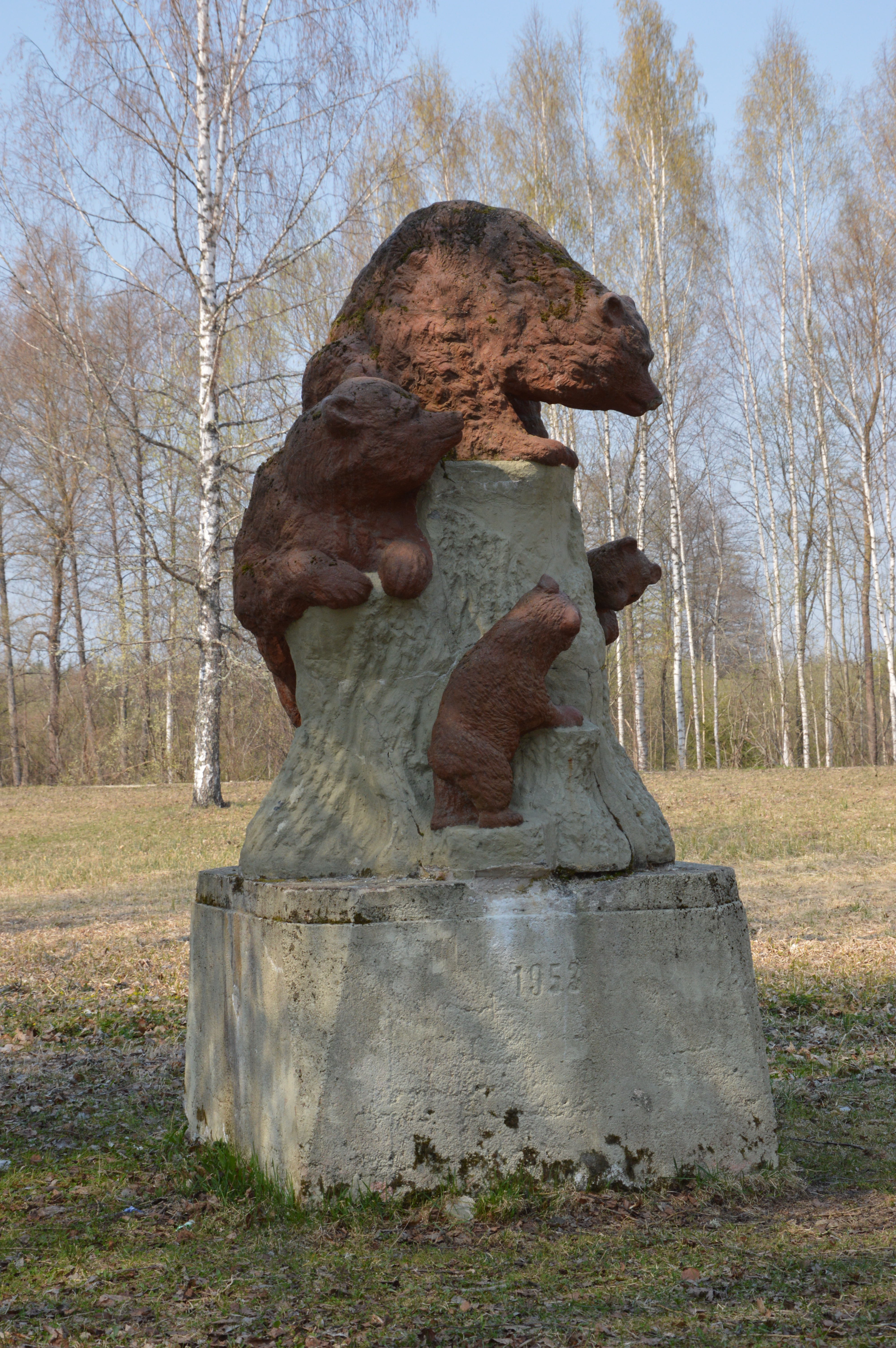 Skulptuurigrupp Karud Mõnistes.